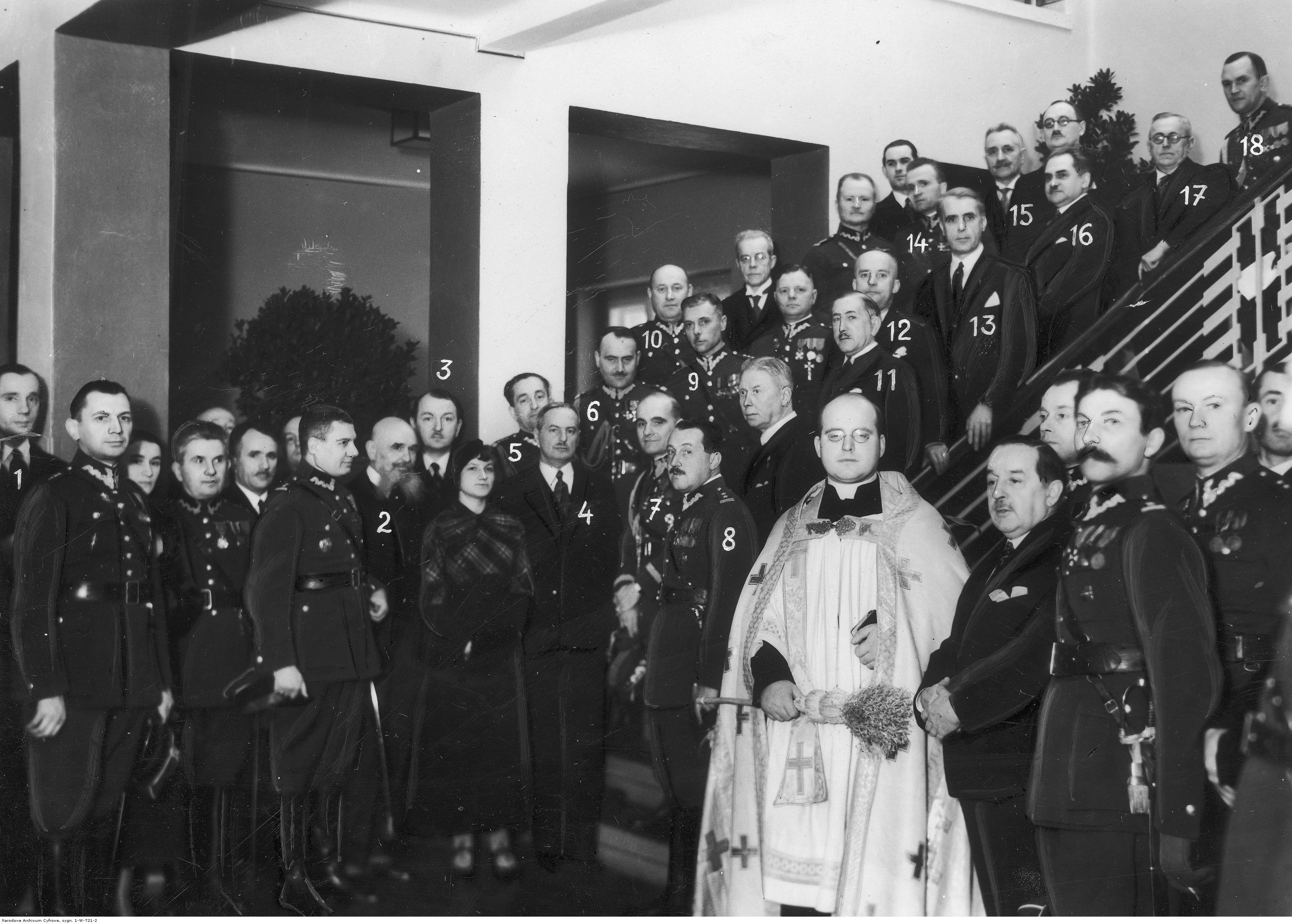 Poświęcenie nowego pawilonu VII Okręgowego Szpitala Wojskowego w Poznaniu. Fotografia grupowa uczestników uroczystości. Widoczni m.in.: starosta grodzki poznański Marian Bożydar-Podhorodeński (1), hrabia Stanisław Breza (2), dr Zygmunt Słoniński (3), wicewojewoda poznański Stanisław Kaucki (4), płk Stanisław Świtalski (5), gen. Franciszek Wład (6), gen. Sergiusz Zahorski (7), płk dr Jan Mintowt-Czyż (8), płk dr Teofil Kucharski (9), płk Kazimierz Sokołowski (10), prof. Stanisław Runge (11), prof. dr Karol Gustaw Jonscher (12), prof. dr Antoni Tomasz Jurasz (13), płk Michał Gałązka (14), płk dr Józef Aleksander Krysakowski (15), radca miejski, dr Tadeusz Szulc (16), prof. Leon Padlewski (17), por. Zniński (18), ks. dziekan Franciszek Dymarski (z prawej na pierwszym planie, w kapie i z kropidłem). Koncern Ilustrowany Kurier Codzienny - Archiwum Ilustracji. Sygnatura: 1-W-721-2